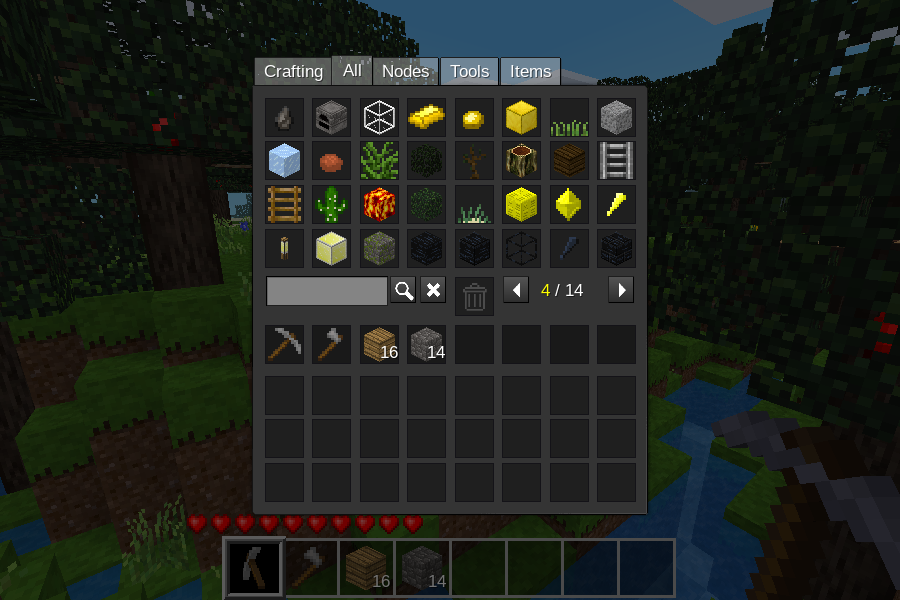 Creative inventory tab